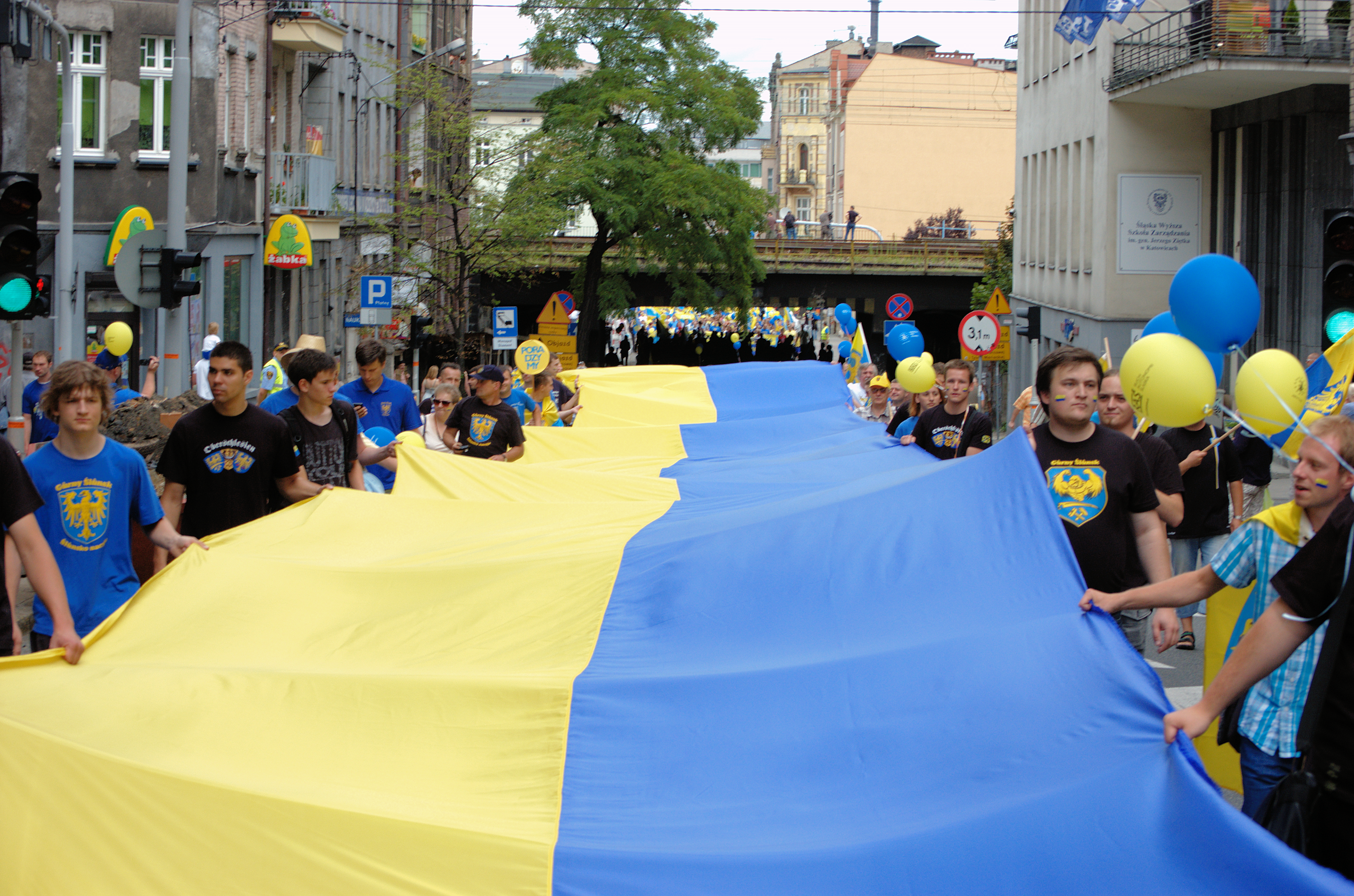 Ponad 5000 Górnoślązaków, zwolenników autonomii regionalnej przemaszerowało 14 lipca 2012 roku ulicami Katowic. Z każdym rokiem to patriotyczne święto przyciąga coraz większą liczbę uczestników. Jednym z symboli marszu była 100 metrowa górnośląska flaga - najdłuższa w historii. Over 5000 Upper Silesians and supporters of the idea of regional autonomy marched on the 14th of July 2012 through the streets of Katowice. The regional festival of patriotism is attracting more and more people with each year. One of the symbols on the march was the 100 metres long flag of Upper Silesia - the longest in history.